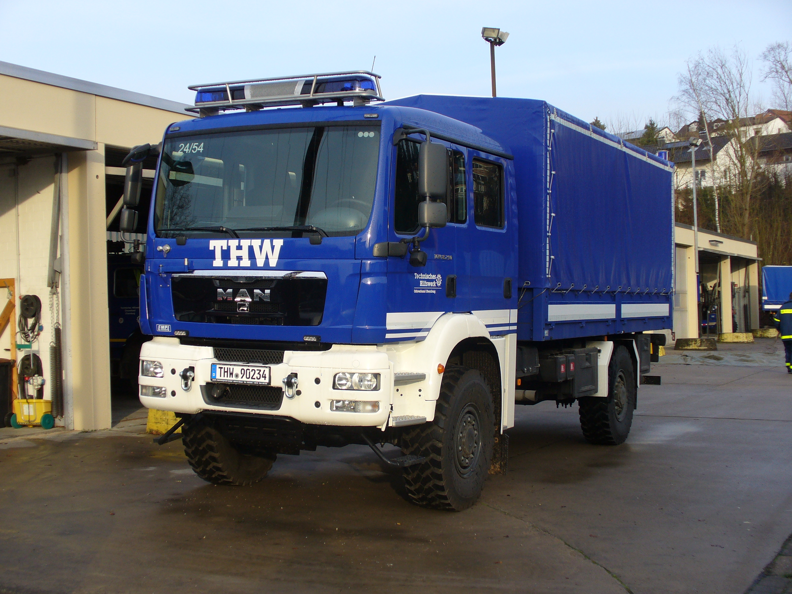 Der MzKW des Ortsverbands Obernburg